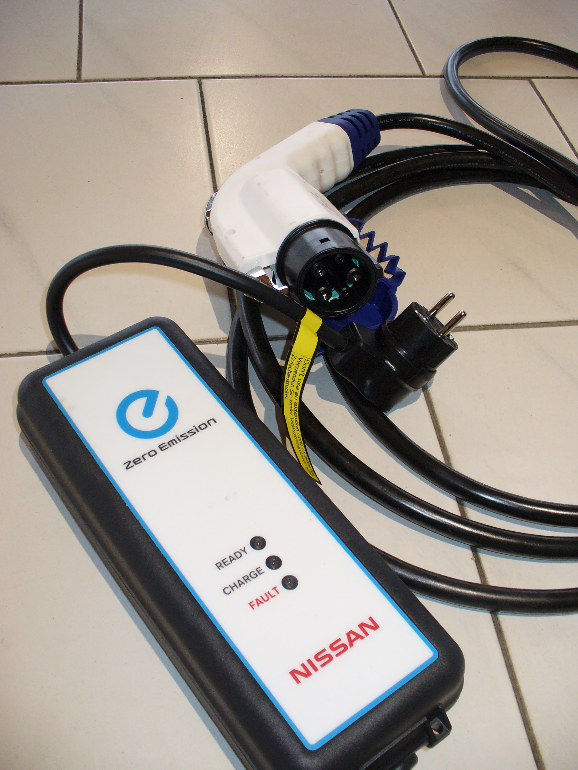 Nissan Leaf Ladekabel 230V Schuko mit Adapterbox (Phasenprüfung, Erdung) Ladeleistung maximal 2,3kW (10A Dauerstrom an 230V)